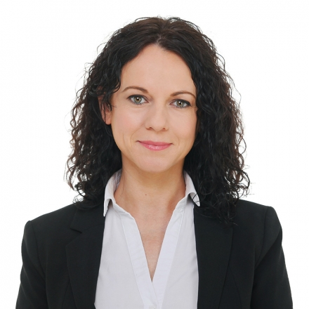 Szabó Tímea (Budapest, 1976. január 18. –) magyar politikus, független országgyűlési képviselő, a Párbeszéd Magyarországért párt (PM) társelnöke. 2013-ig a Lehet Más a Politika (LMP) tagja és parlamenti frakcióvezető-helyettese volt.